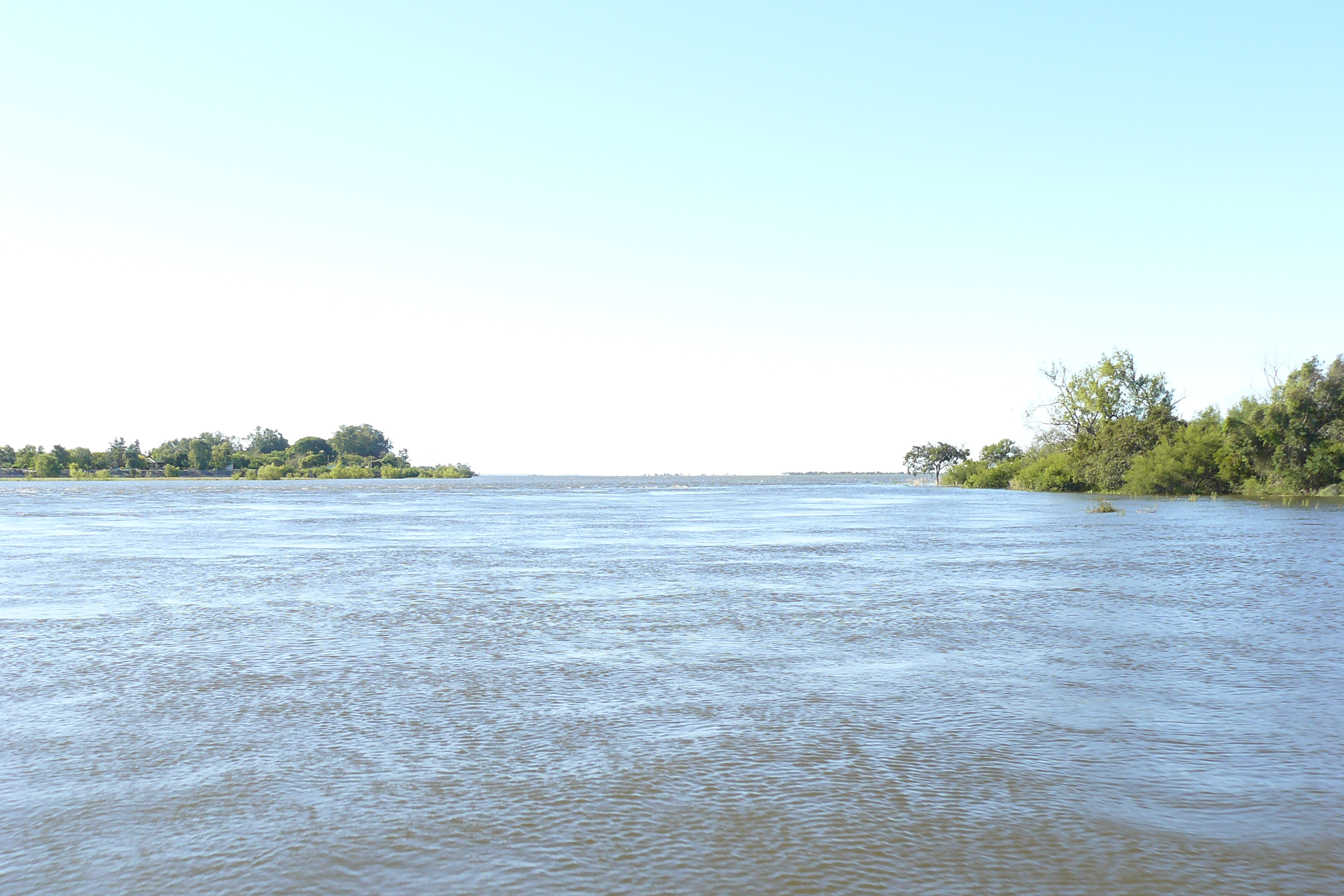 Curso del rio San Javier frente a la localidad de Helvecia, provincia de Santa Fe - Argentina